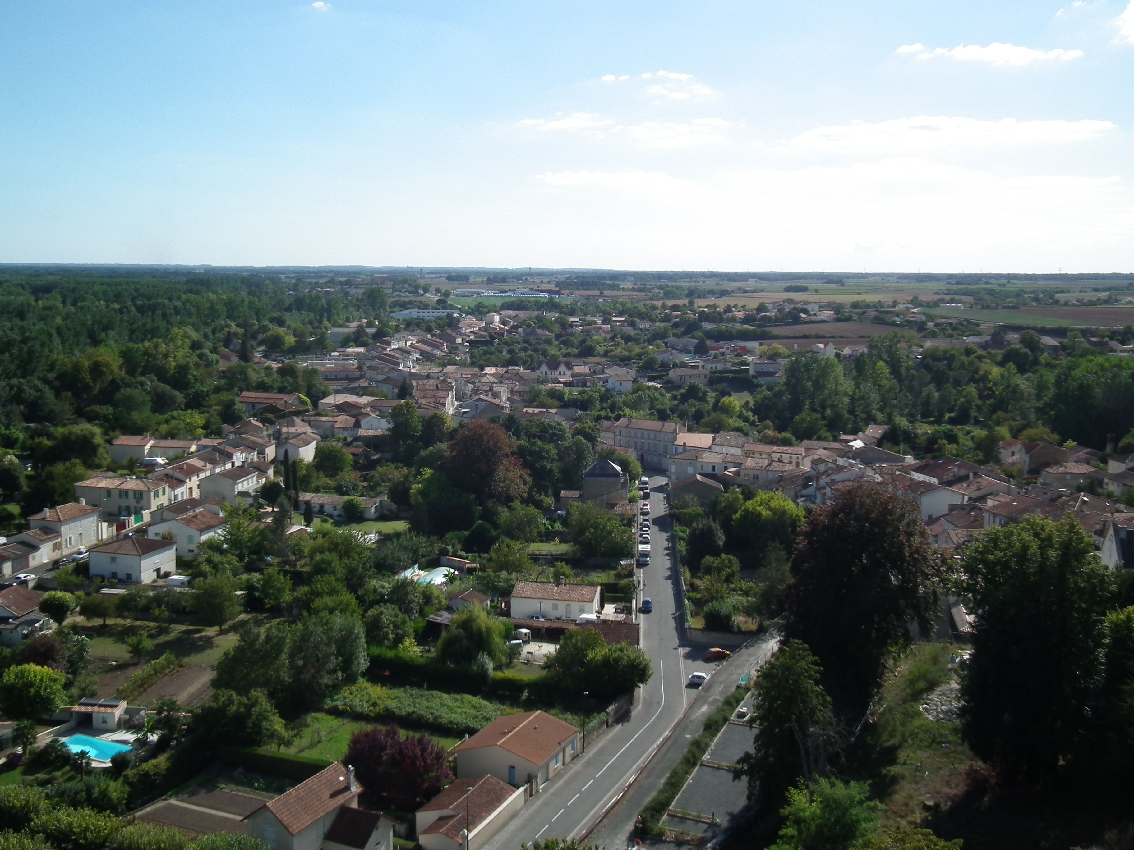 Le faubourg Saint-Vivien à Pons